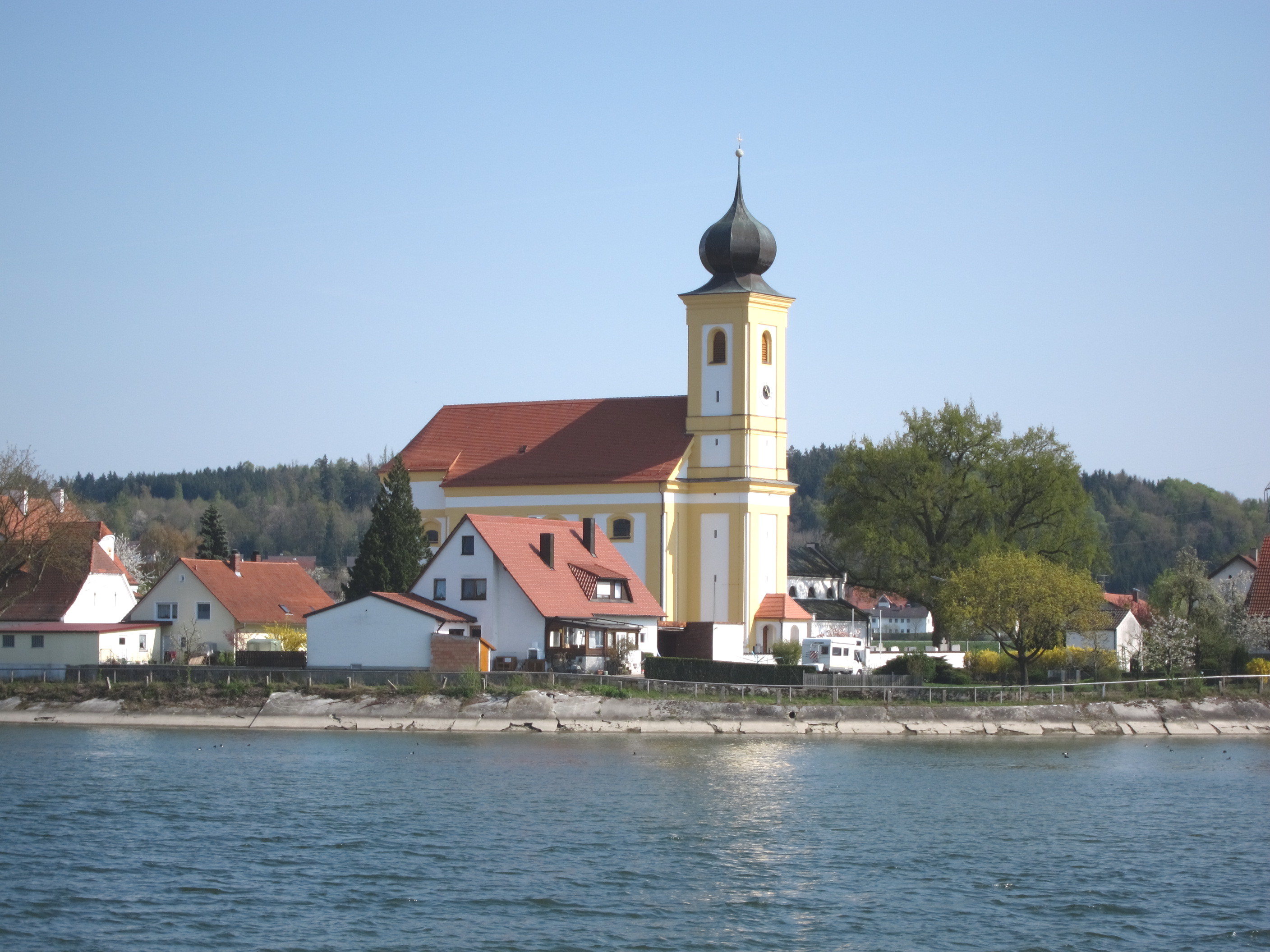 Pfarrkirche St. Johann Baptist in Eching am Speichersee des Mittlere-Isar-Kanals